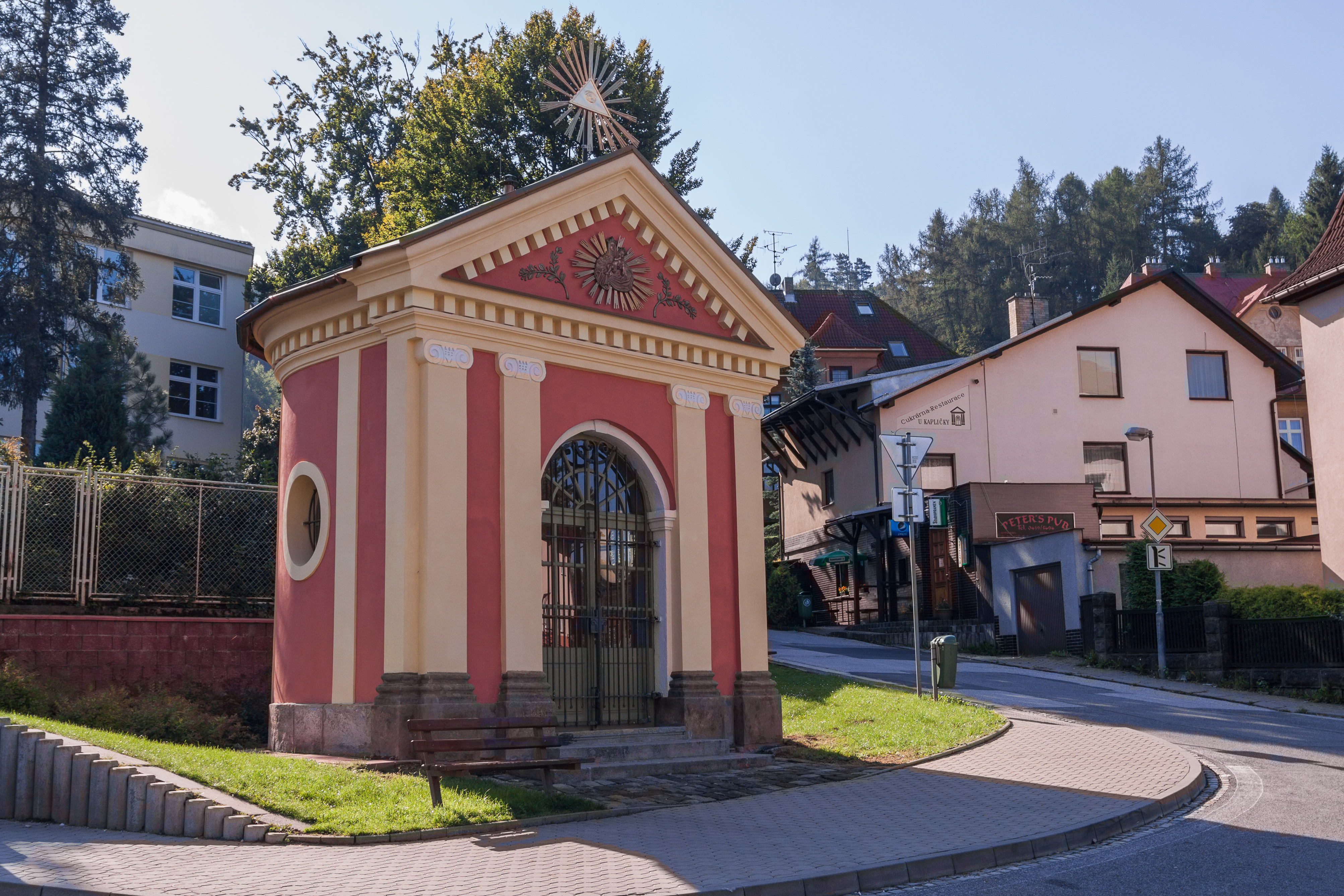 Kaple sv. Jana Nepomuckého (Trutnov), Maxima Gorkého, Trutnov